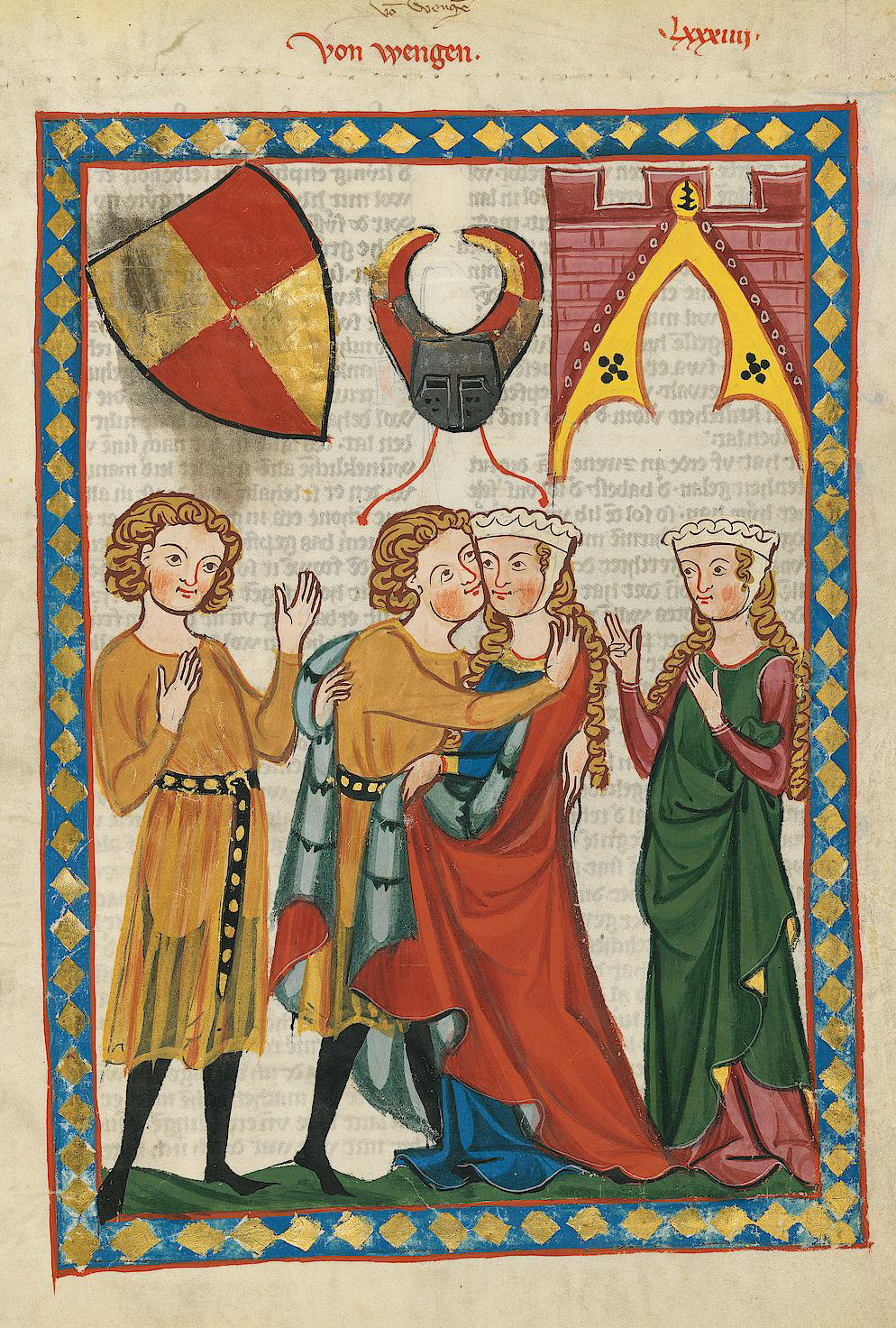 Codex Manesse, UB Heidelberg, Cod. Pal. germ. 848, fol. 300r: Von Wengen Folio 300, recto